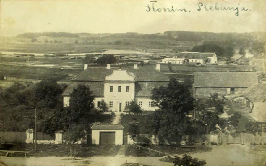 Беларуская (тарашкевіца): Слонім (Słonim), Замосьце (Zamoście). Плябанія пры касьцёле Сьвятога Андрэя